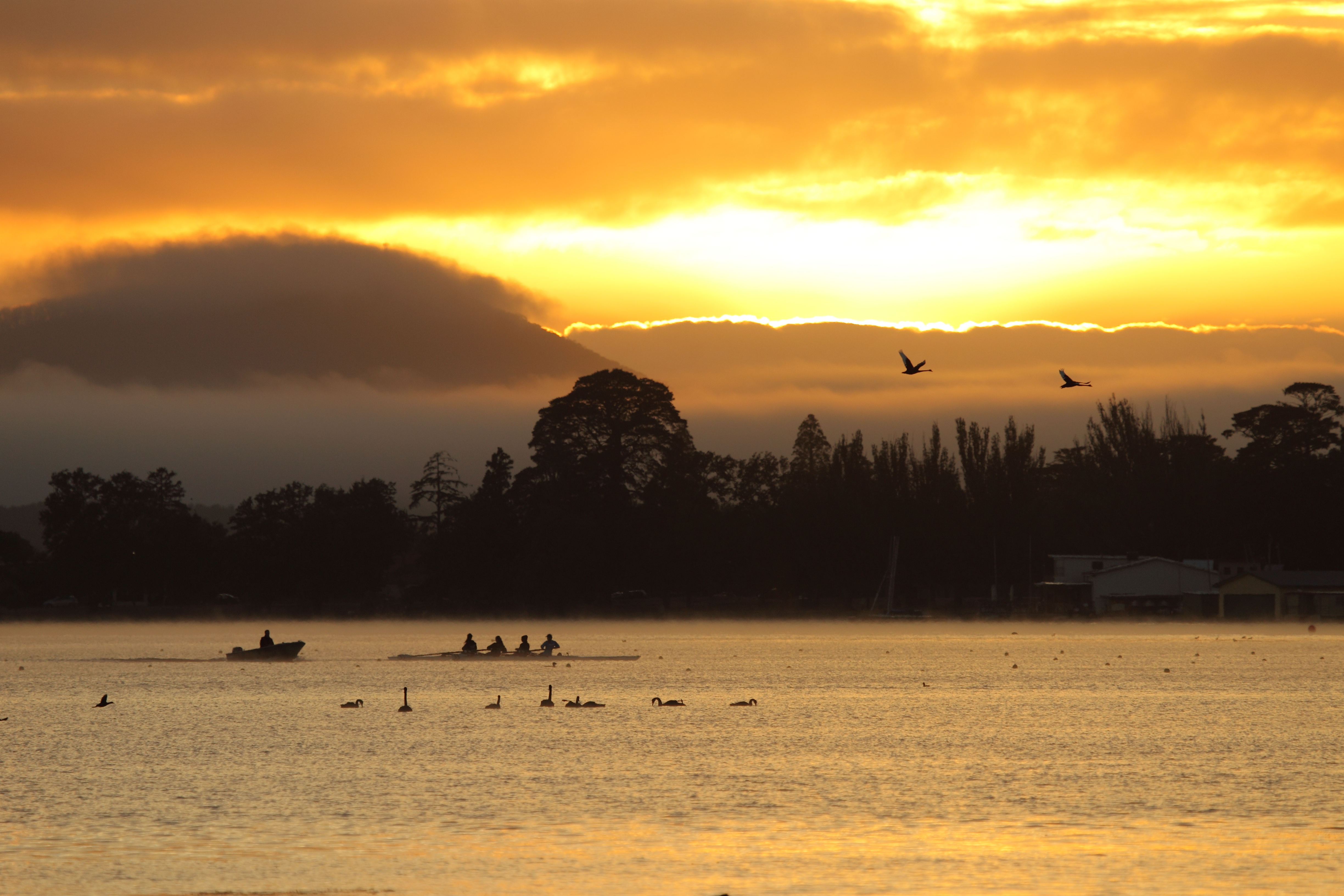 Lake Wendouree. Ballarat.